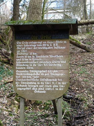 Bron van de Orke